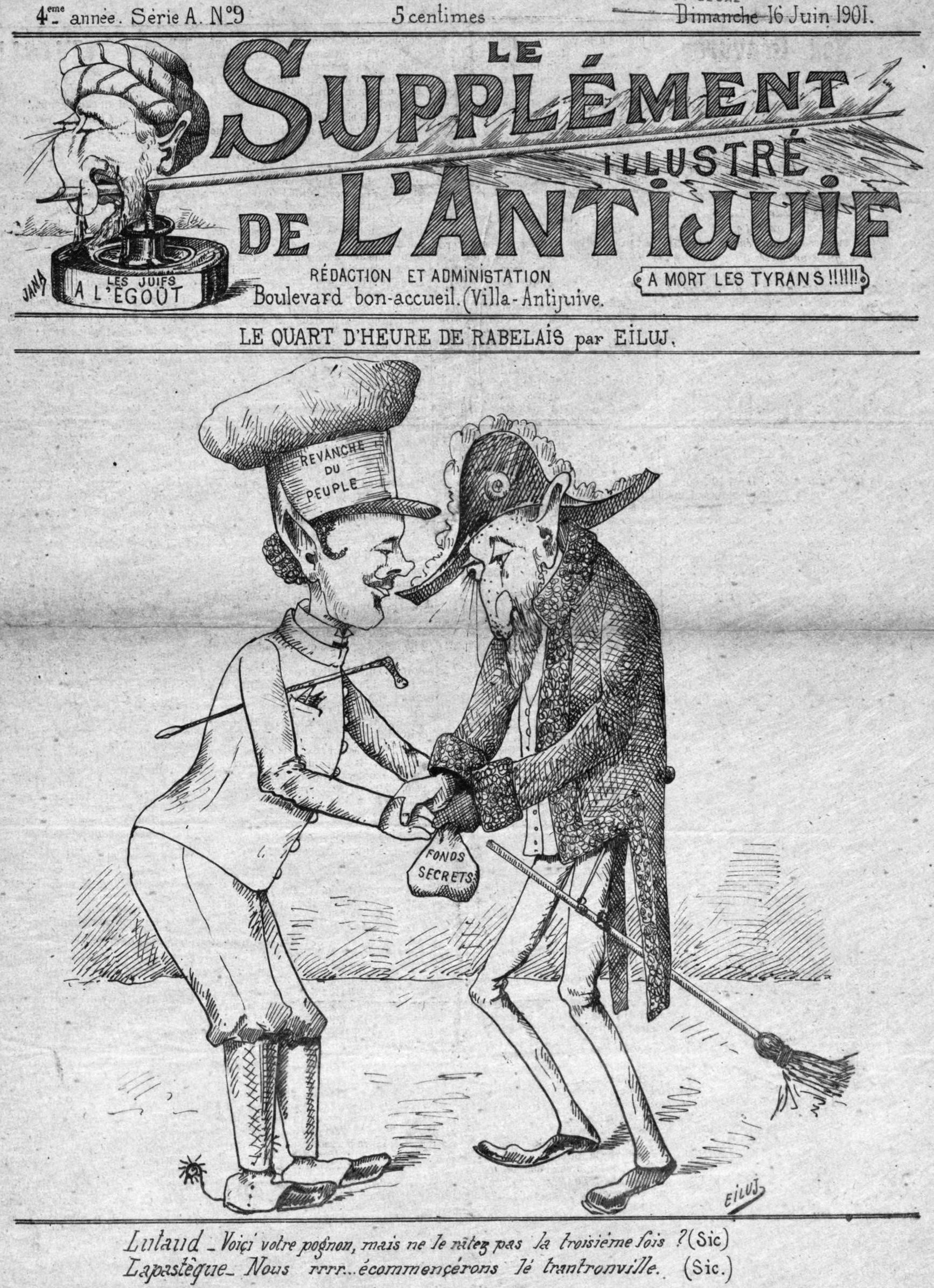 "Le quart d'heure de Rabelais, par Eiluj".